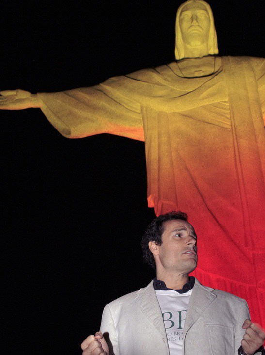 Humberto Silva discurso sob O Cristo Redentor no Dia Mundial do Combate às Hepatites.